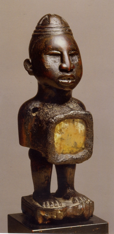 Statua reliquiario - La figura presenta il volto pieno e tendenzialmente realistico dello stile bakongo. La fronte è bombata, il naso diritto con larghe narici, la bocca carnosa con labbra semiaperte a mostrare i denti. Gli occhi dovevano avere in orgine inserti di vetro o altro materiale a rappresentare la pupilla. Le braccia aderenti al busto sorreggono un reliquario che copre tutta la superficie del torso e che è chiuso da un vetro. All'interno è raccolta la "medicina". Le gambe diritte con piedi ben delineati poggiano su un piedistallo a base rettangolare. Patina lucida o crostosa a seconda delle parti. Queste figure antropomorfe con reliquario sono quelle che gli europei hanno chiamato a lungo "feticci". Si tratta di "figure dotate di potenza" che vengono usate sia per curare sia per dare la caccia ai ladri, sedurre le donne ecc. Specchi e vetri rimandano alla capacità di vedere di queste figure, in particolare in direzione del mondo dei morti. La parte più rilevante è quella nascosta, la "medicina", in rapporto alla quale la parte più propriamente scultorea funge da involucro, contenitore, mascheramento. Un defunto o uno spirito attivano la figura.